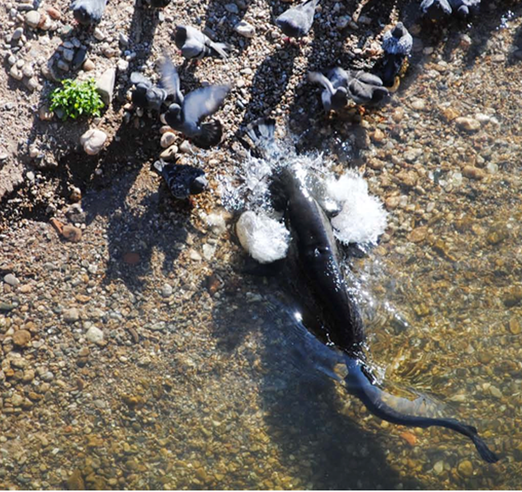 Silures pratiquant l'échouage volontaire dans le Tarn pour capturer des pigeons